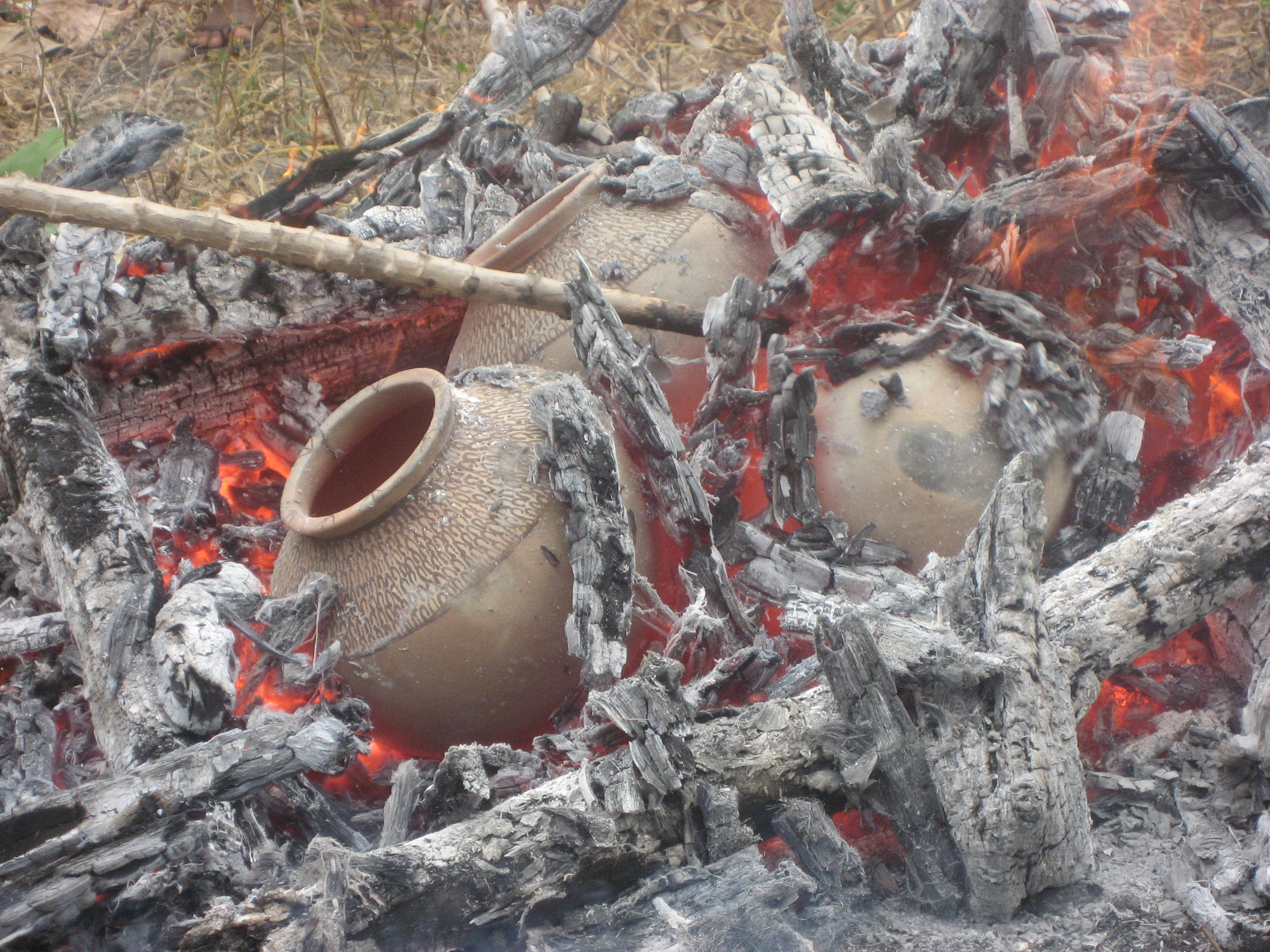 Tonkrüge in Osttimor zum Kochen